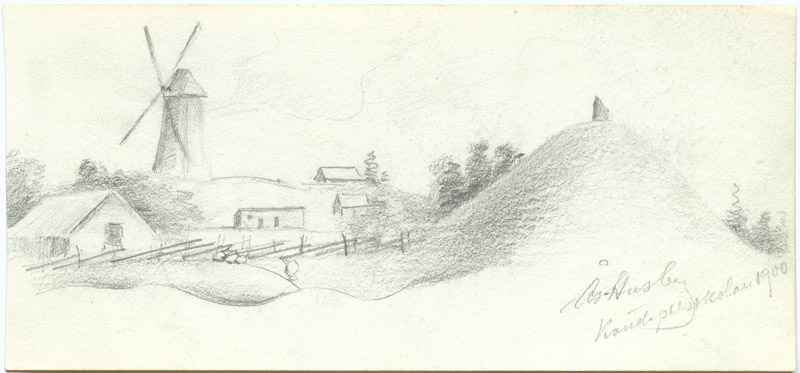 Raä-nr: Norrsunda 31:1. Gravfält vid Åshusby med gravhögar, stensättningar och resta stenar. Blyertsteckning från 1900. Motiv: Norrsunda 31:1 Kategori: Teckning, Gravfält Raä-nr: Norrsunda 31:1. Gravfält vid Åshusby med gravhögar, stensättningar och resta stenar. Blyertsteckning från 1900. Norrsunda 31:1.